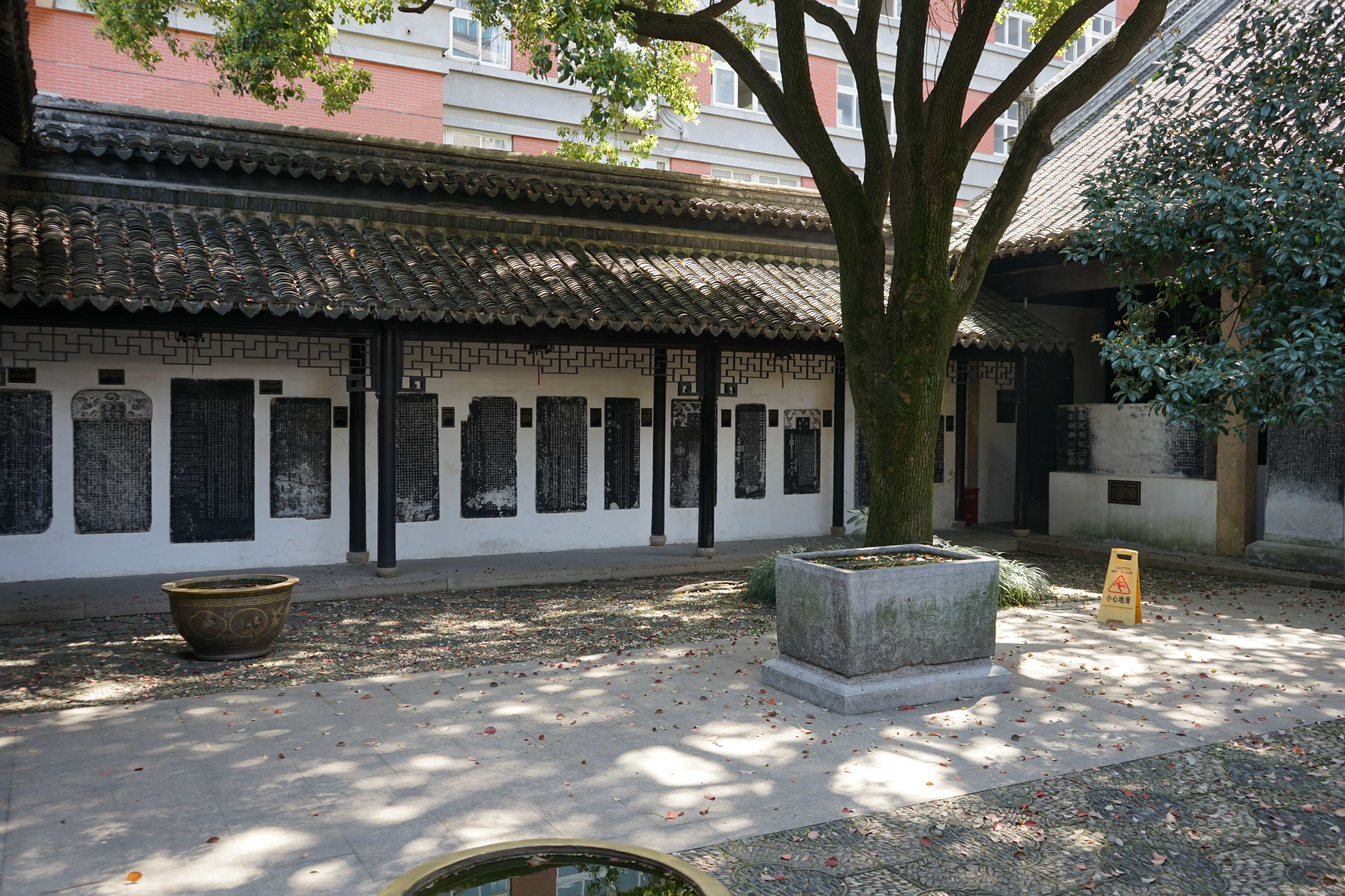 中文（中国大陆）: 无锡县学古碑刻